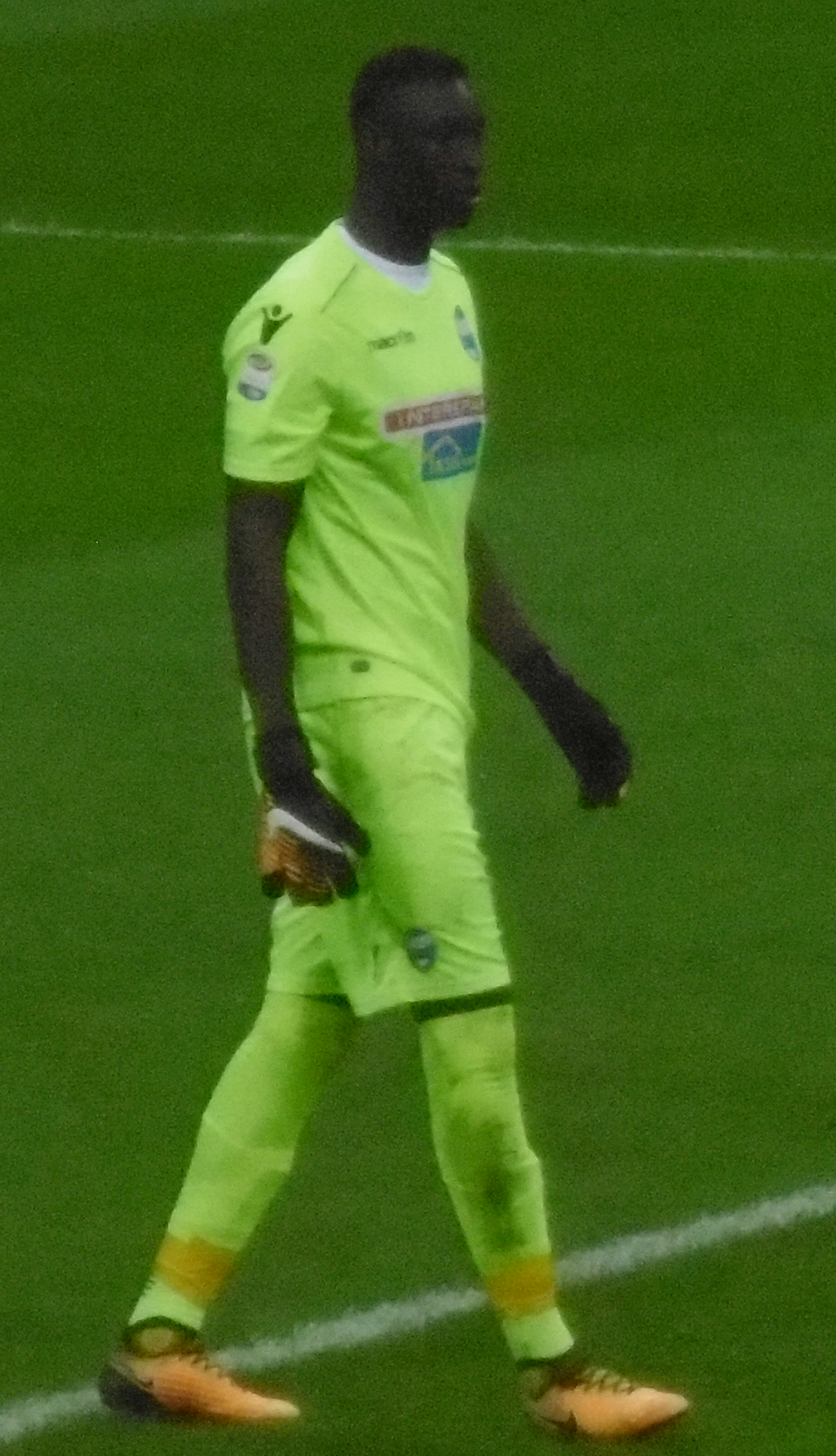 Alfred Gomis nella partita Milan - Spal del 20 settembre 2017, Stadio Meazza (Milano)